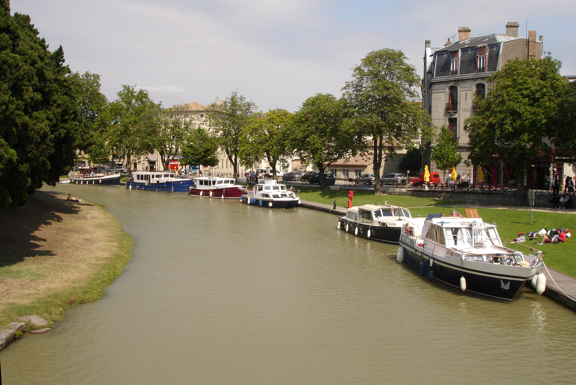 france, Aude (11), Carcassonne, canal du Midi